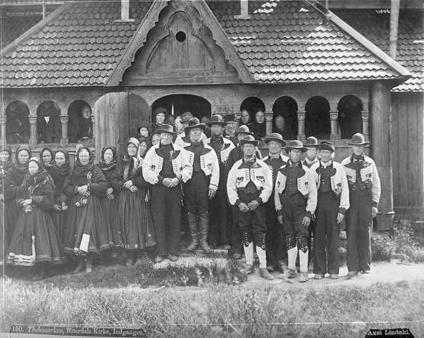 Kyrkjelyden ved Heddal stavkyrkje